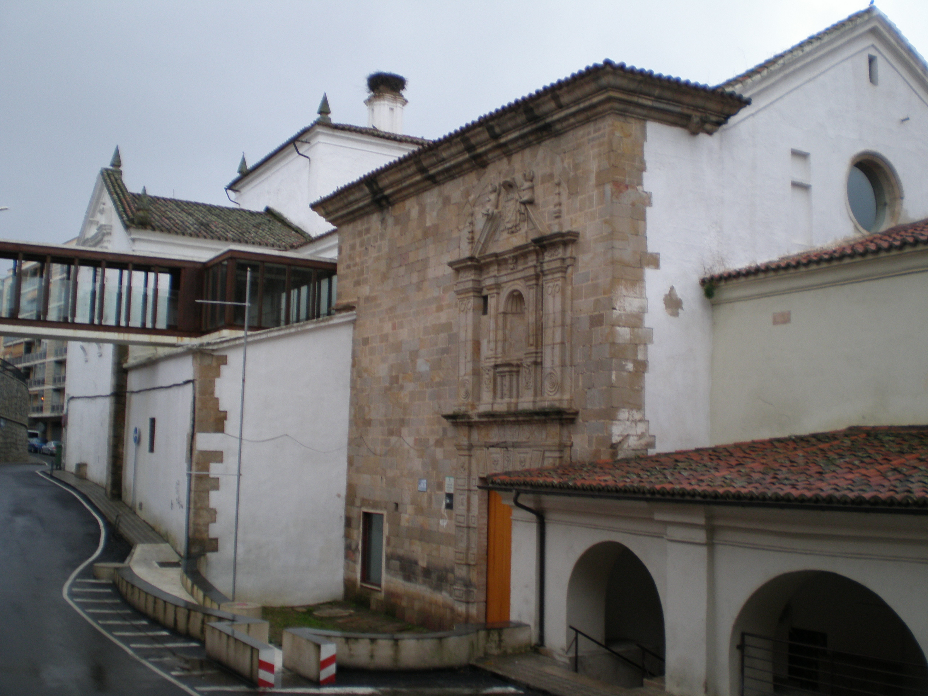 Complejo cultural San Francisco en Plasencia